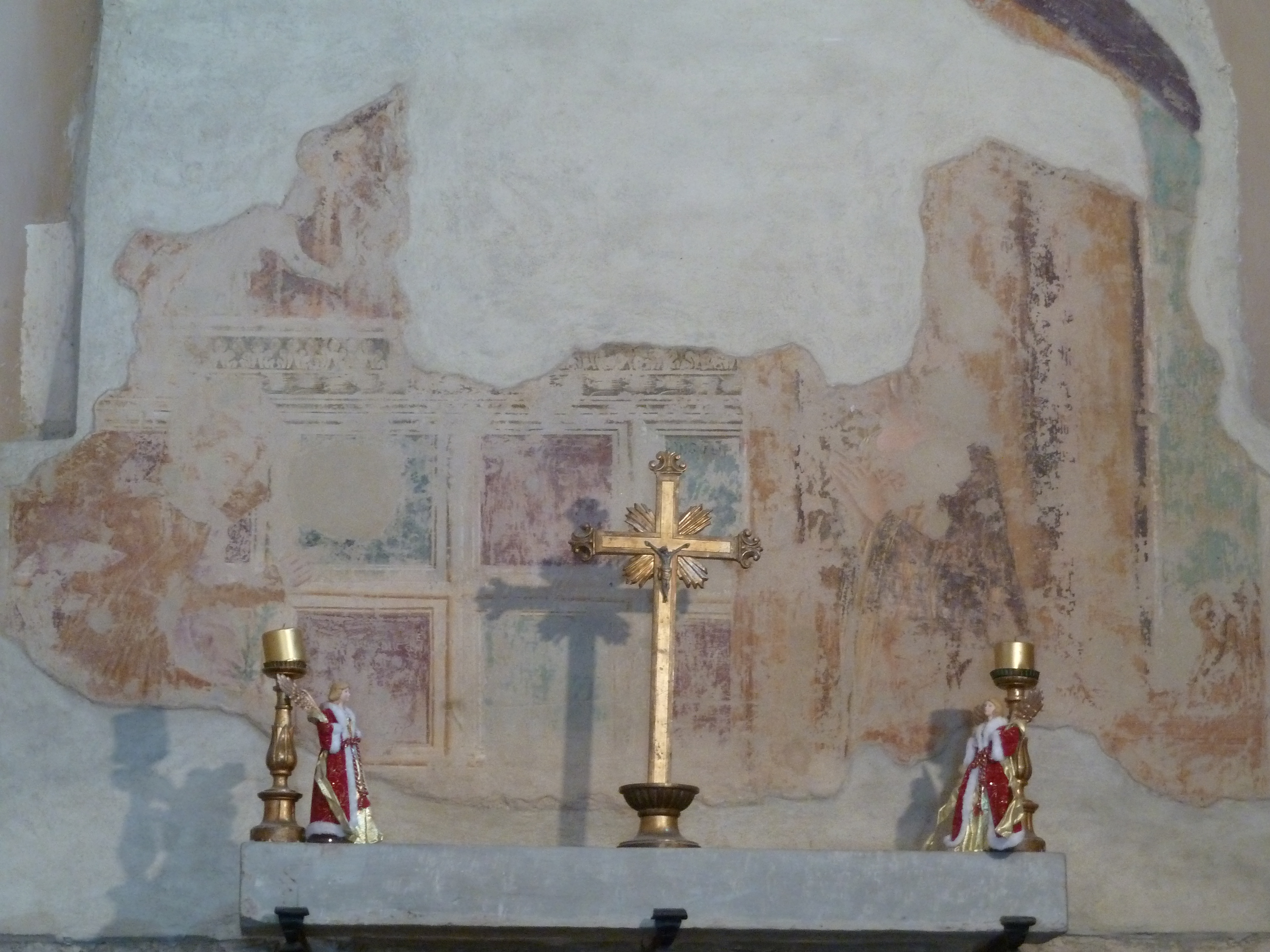 Annonciation, (vers 1450) fresque attribuée à Benedetto Bonfigli, église santa Maria Annunziata-Fontignano